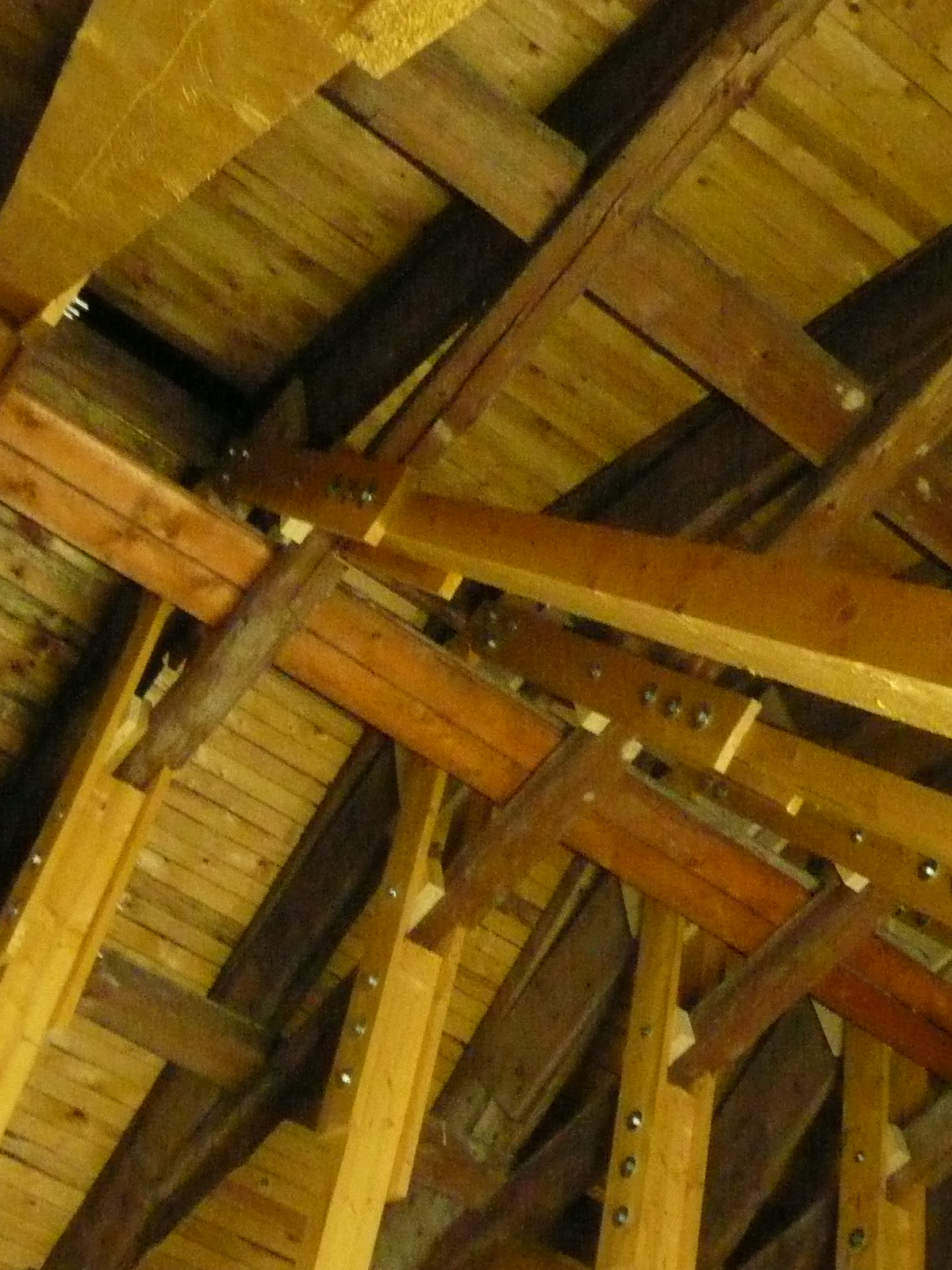 Bohlendach mit Stützkonstruktionen im Dachraum der St. Lucas-Kirche, Pattensen.